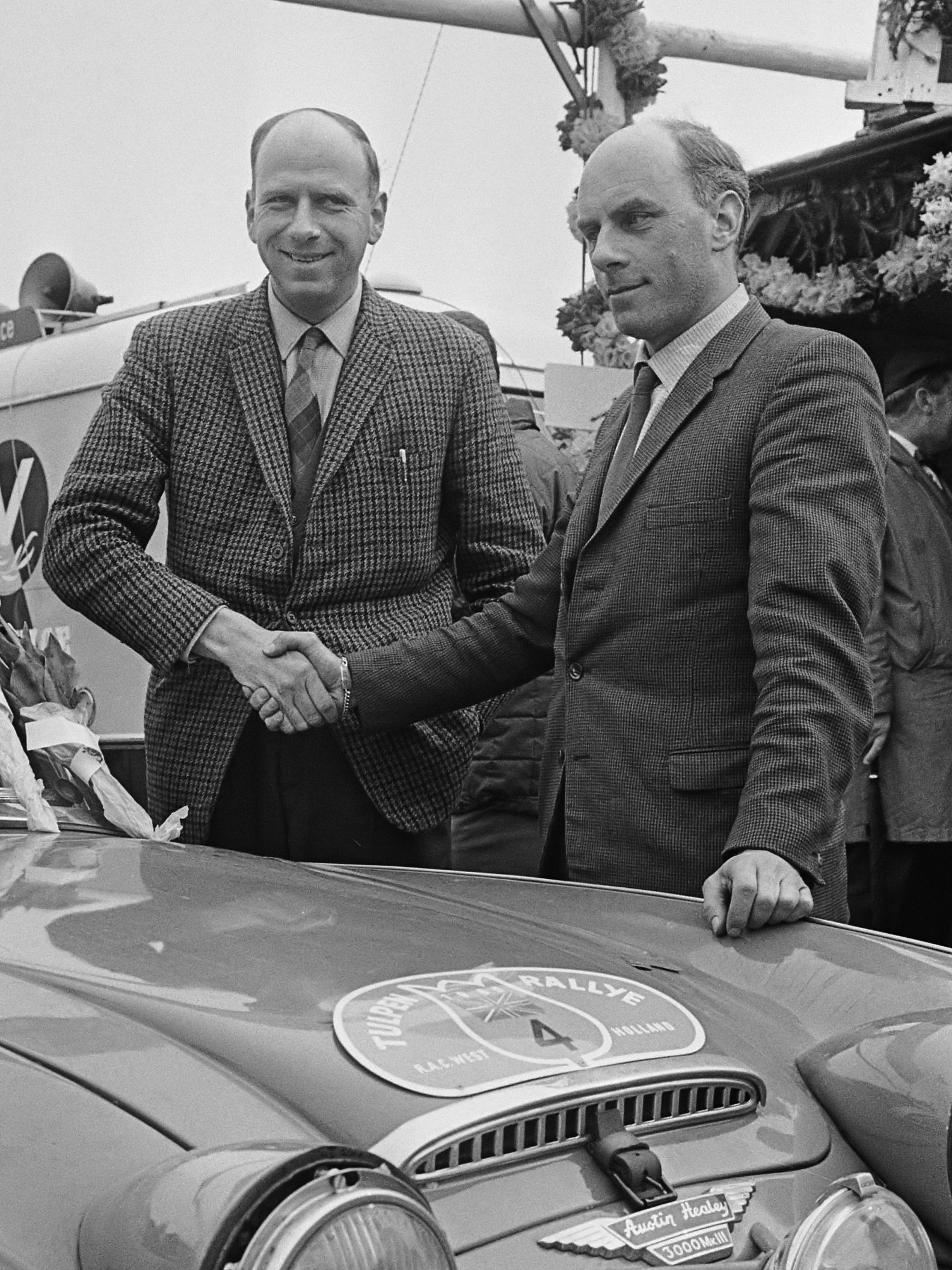 Tulpenrallye 1965, de Engelse equipe van de gebroeders Don (links) en Erle Morley kwamen als eerste binnen 28 april 1965